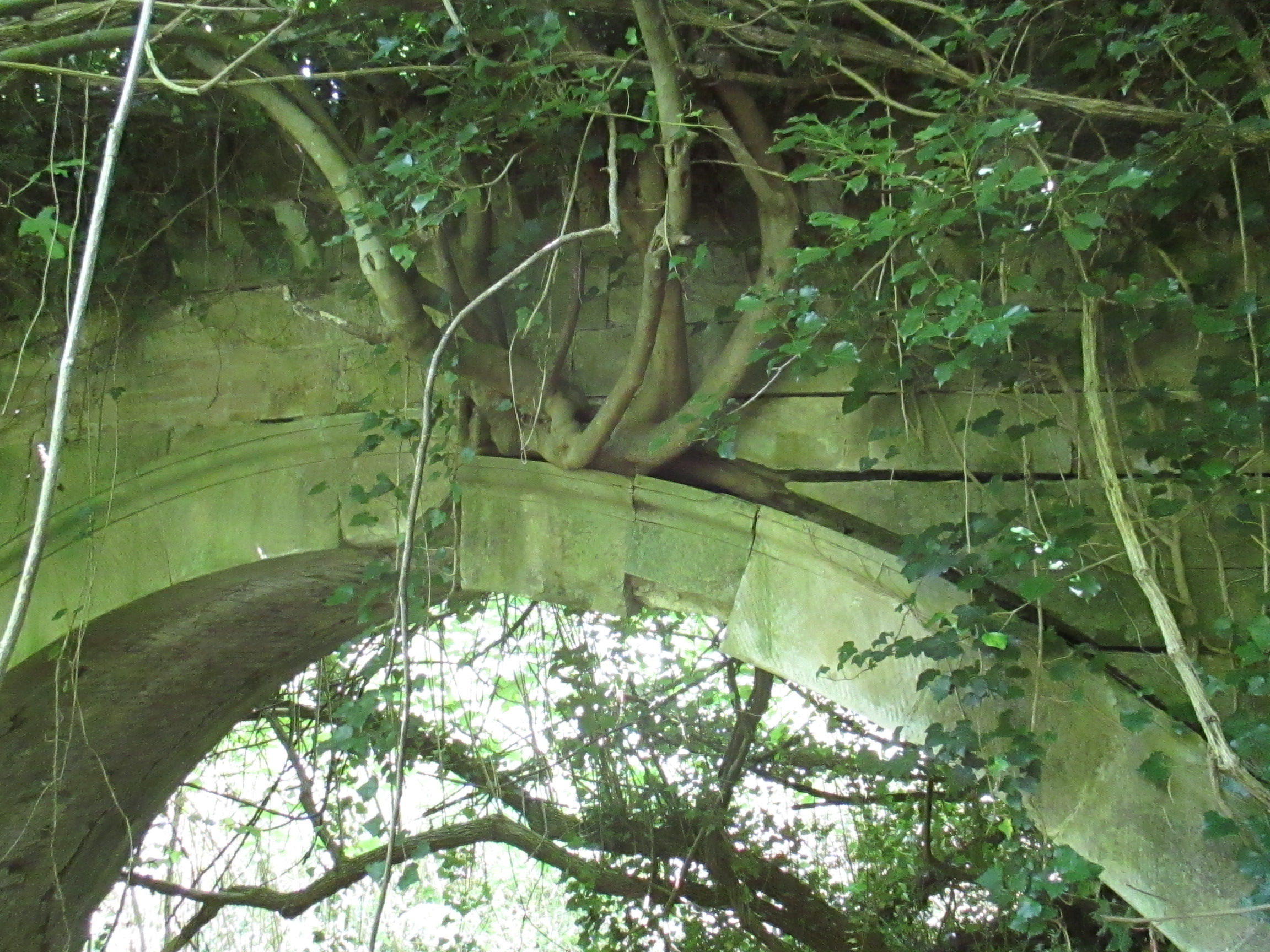 Acquedotto di Colognole, particolare delle arcate della Castellaccia, nel territorio comunale di Collesalvetti, dove la vegetazione sta distruggendo le arcate monumentali delle condotte. L'acquedotto è proprietà del Comune di Livorno e la proprietà si estende su due fasce di rispetto ai lati del manufatto. Ciò nonostante il monumento è lasciato in abbandono.